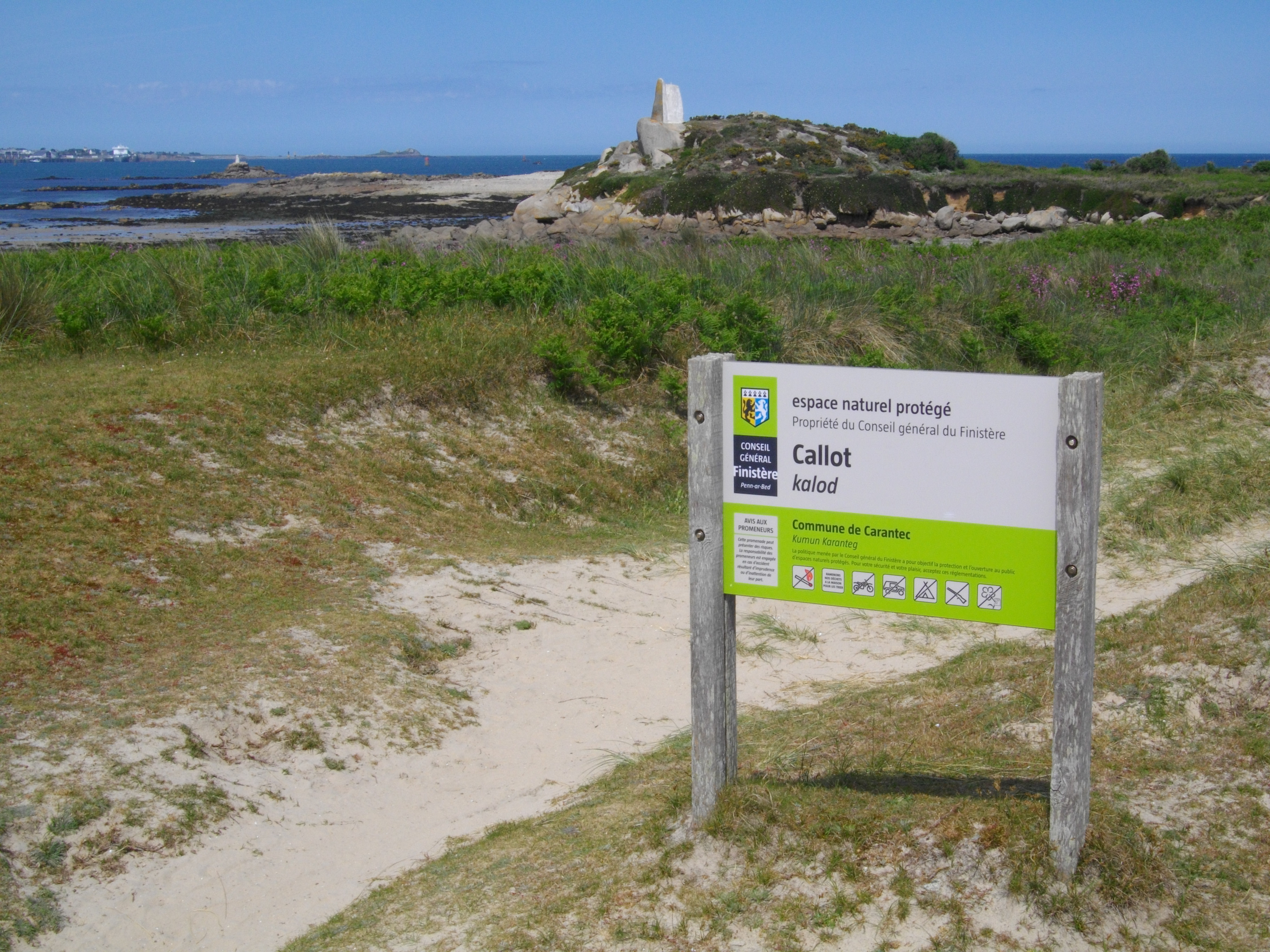 Panneau au nord de la pointe Callot